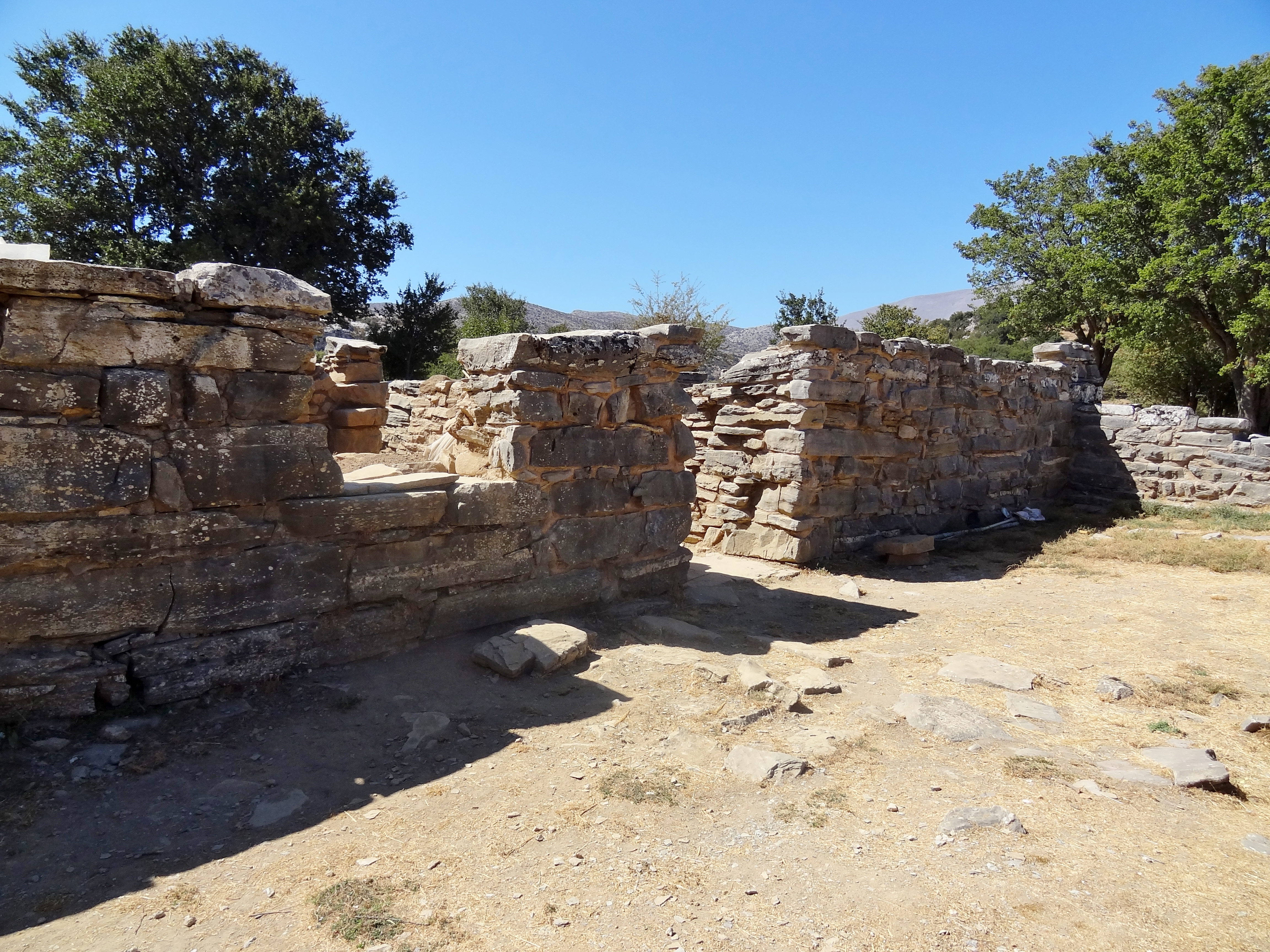 Ausgrabungsstätte von Zominthos, Gemeinde Anogia, Kreta, Griechenland